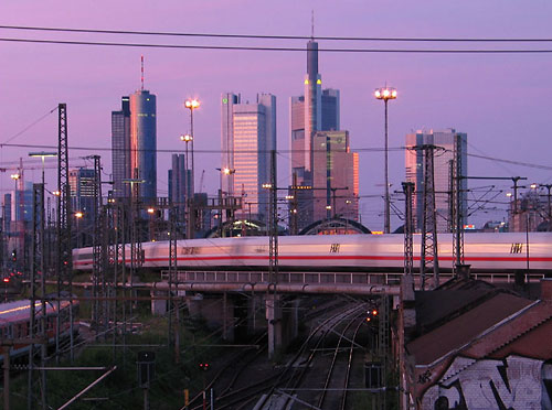 ICE bei der Einfahrt in den Hauptbahnhof Frankfurt am Main, Deutschland (frankfurt_am_main_hbf.jpg)